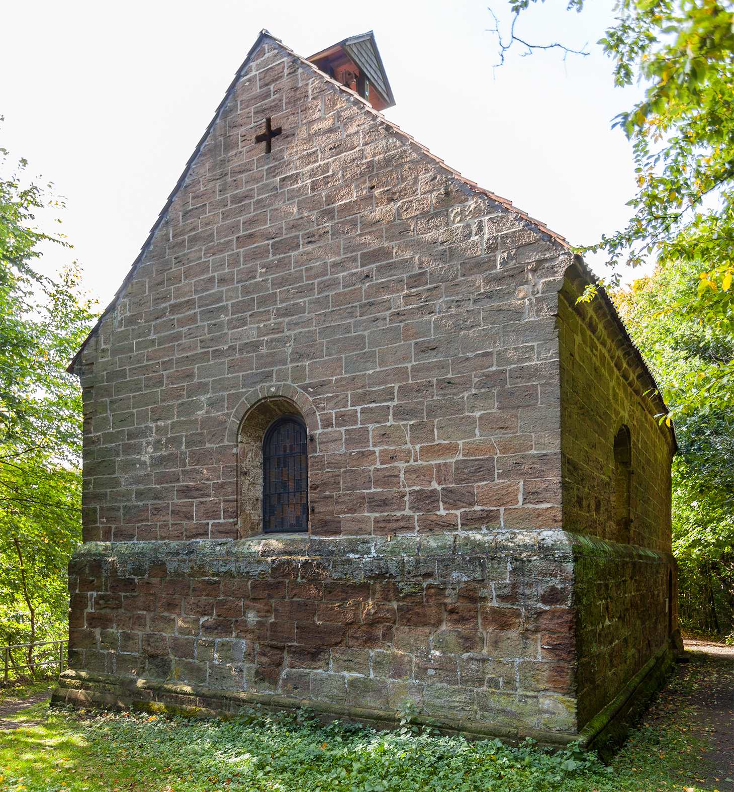 Die Margarethenklus auf dem Wittekindsberg in Barkhausen, Porta Westfalica. This is the photograph of an architectural monument. It is part of the list of cultural monuments of Porta Westfalica, no. 0003